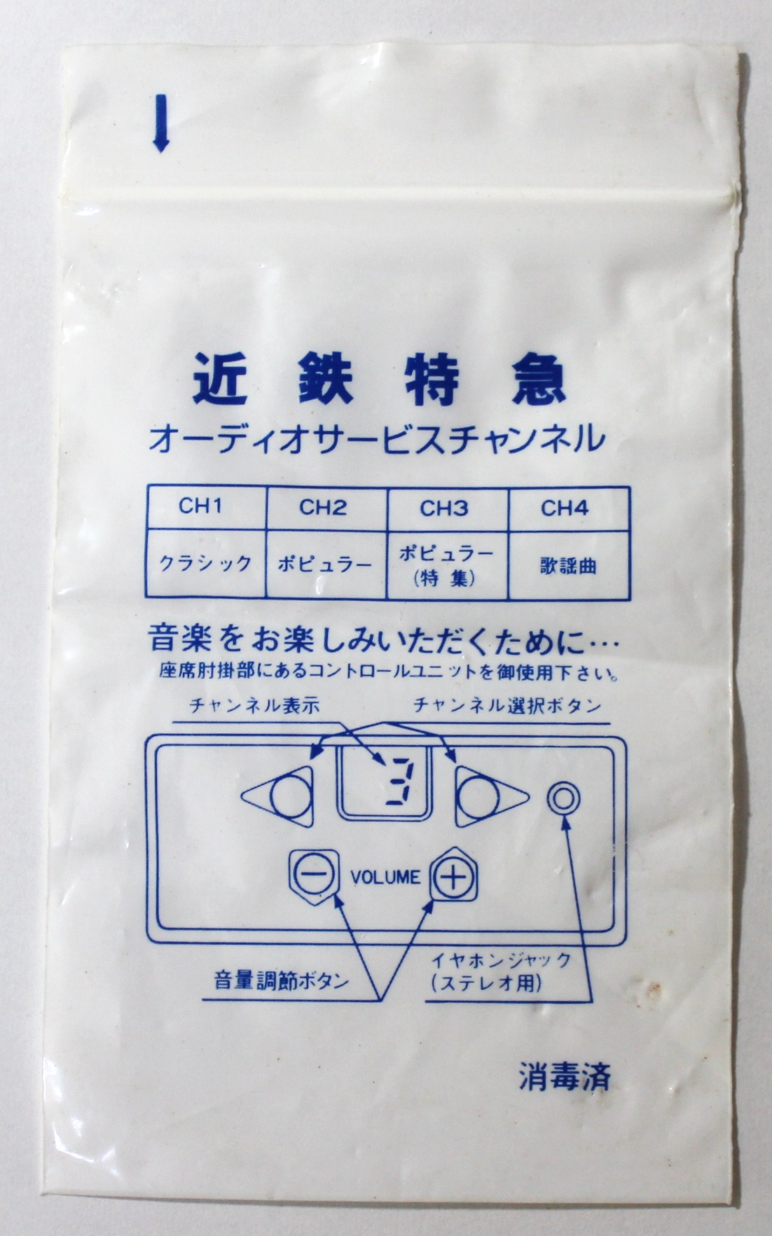 近鉄21000系電車ミュージックサービスに用いるイヤホンを収納する袋